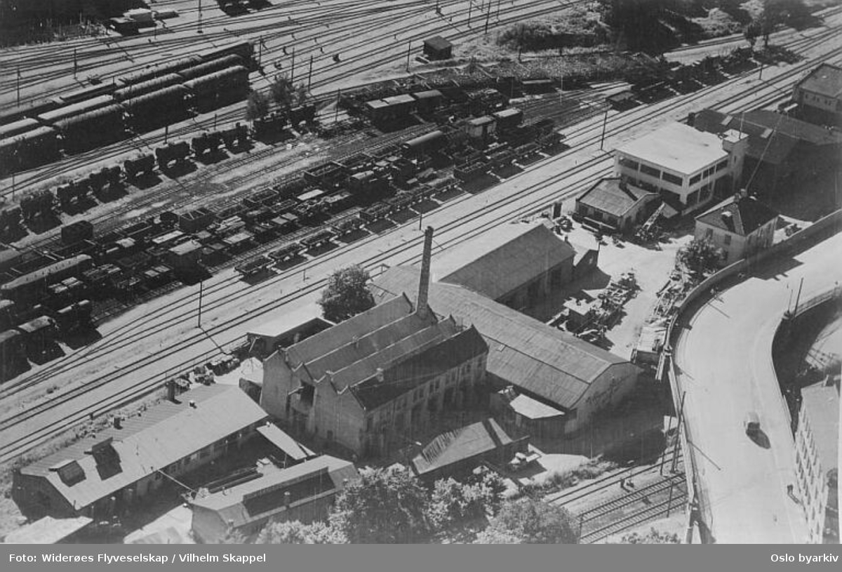 Geijer C & Co Gjærdefabrikk. St. Halvards gt 37, 1951